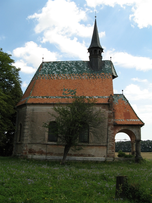 Kaple svatého Rocha, Radišov.